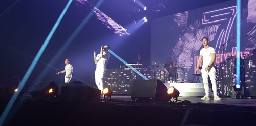 Keen'v 2018 en concert